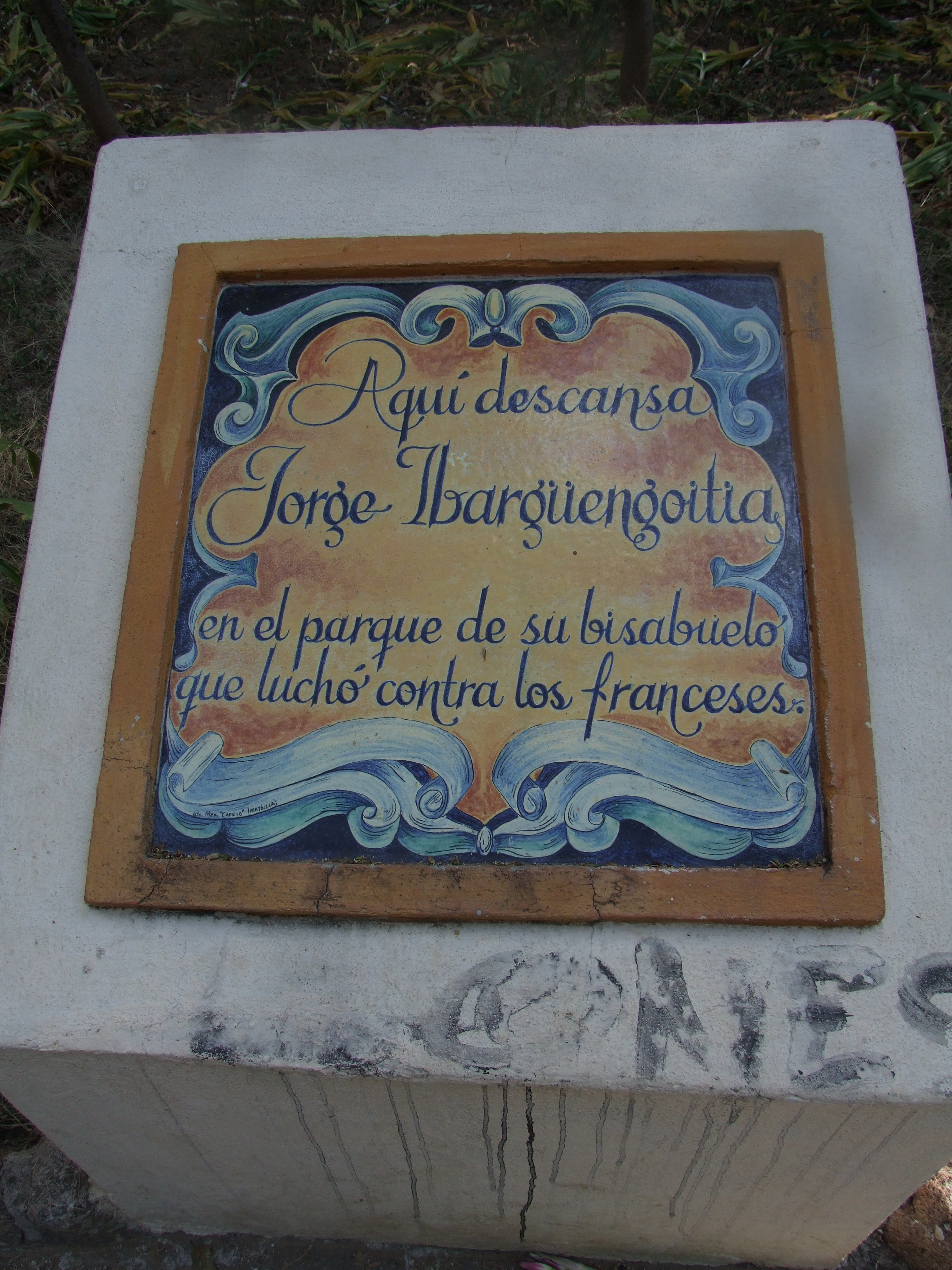 Placa en la tumba de Jorge Ibarguengoitia